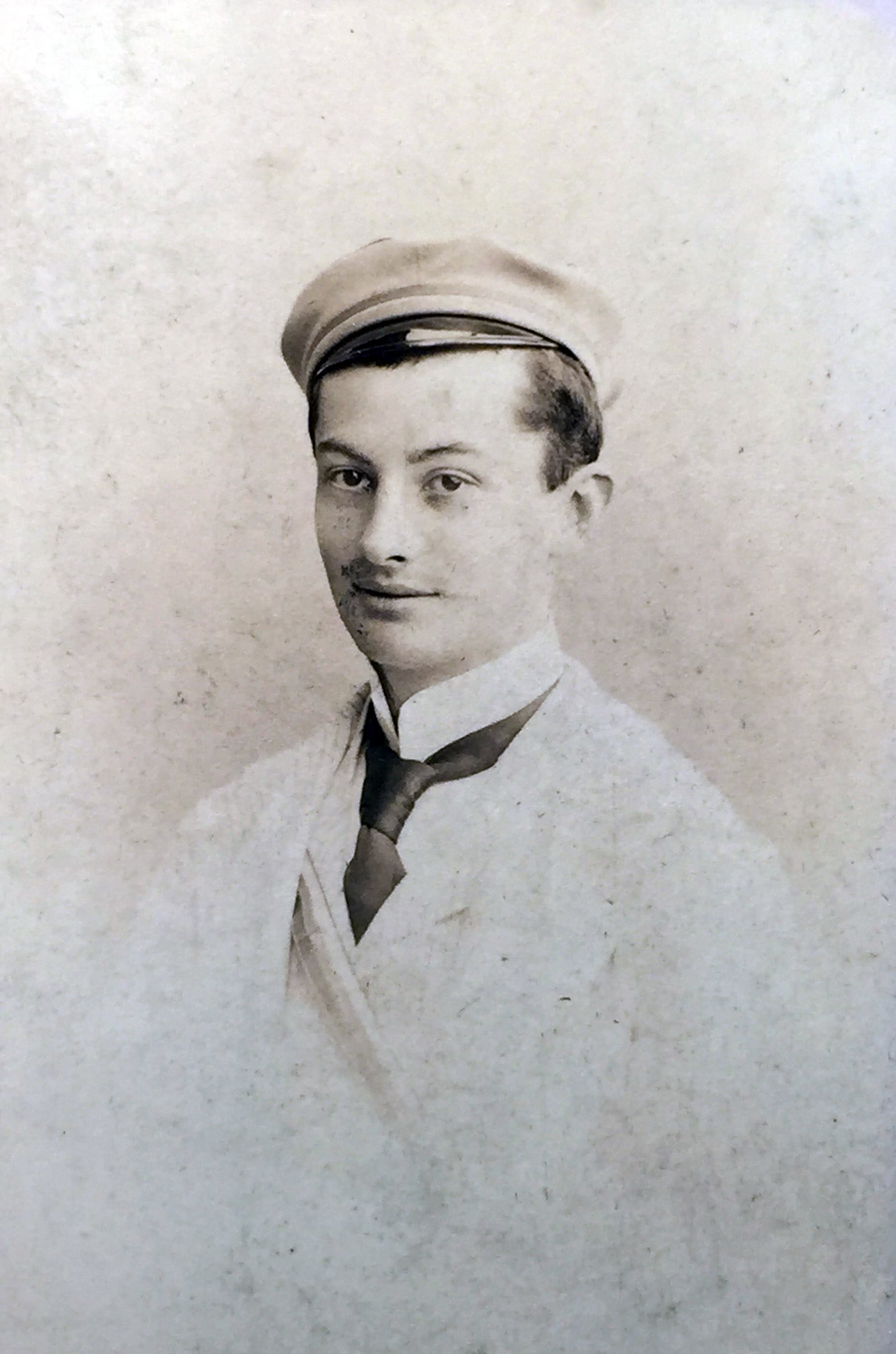 Porträtfotografie von Richard Sarrazin